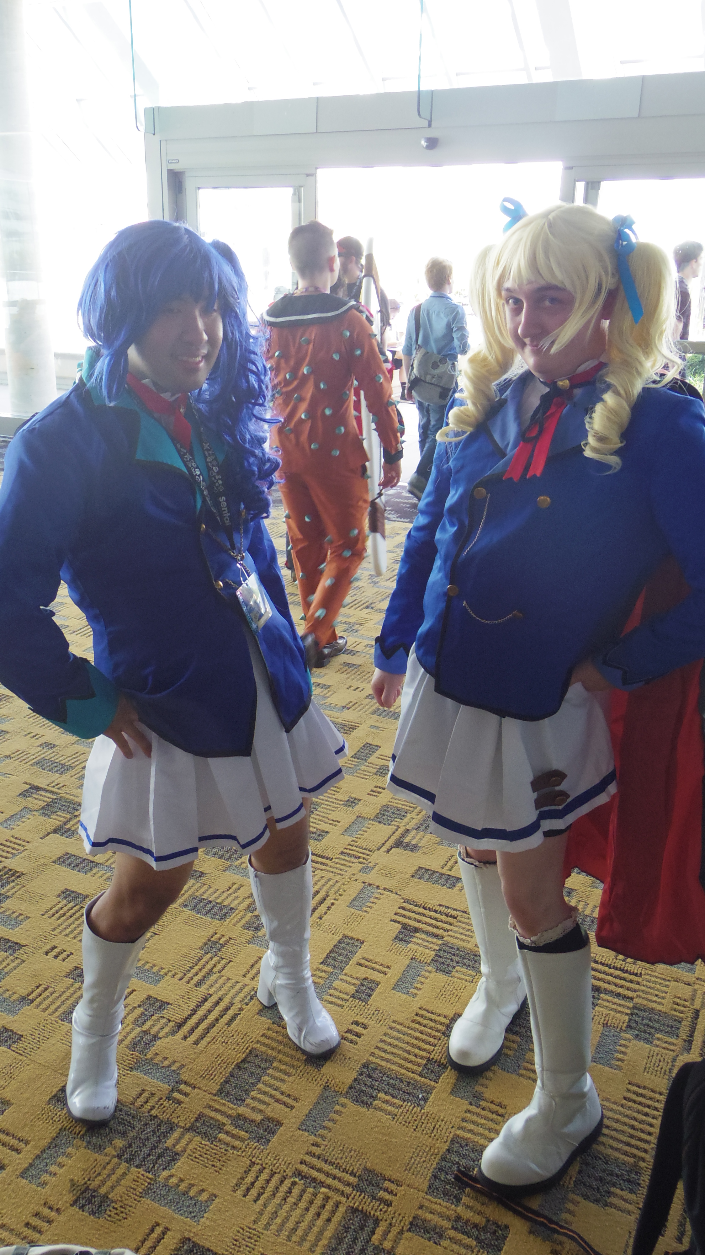 Aoi and Yurika #2.